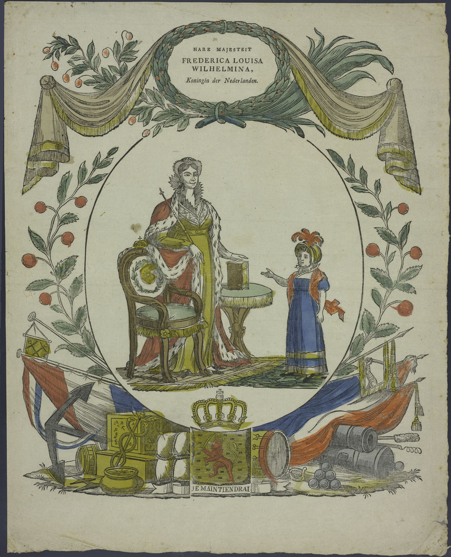 Centsprent met 1 houtsnede, met binnen een ovaal een afbeelding van Frederica Louisa Wilhelmina, koningin der Nederlanden (1774-1837), staande tussen een stoel en een tafel waarop een boek. Ook een jong meisje is afgebeeld. De omkadering bestaat uit afbeeldingen van een plant, kroon, het Nederlandse wapen, oorlogsattributen, kompas, VOC-initialen, mercuriusstaf, anker, vaandel.